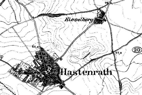 Neuaufnahme 1891-1912